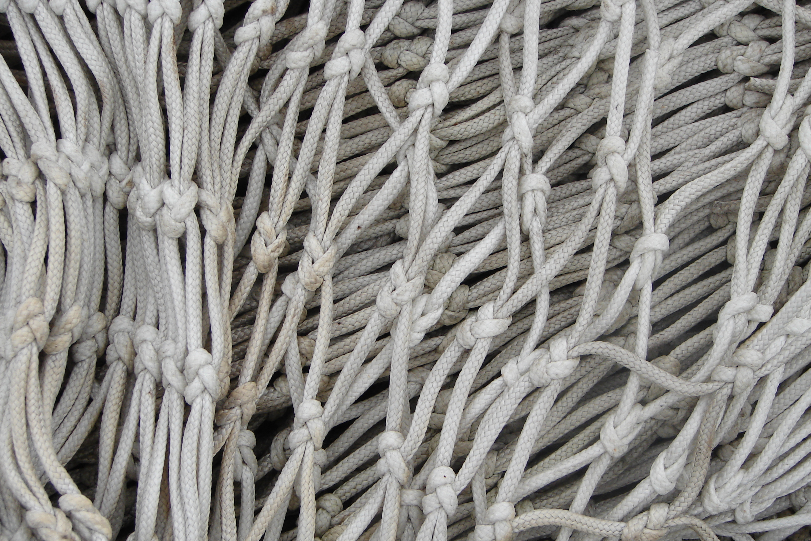 Lieu : Whitstable (Kent/GB), sur le port de pêche Matériel de pêche, filets et cordages